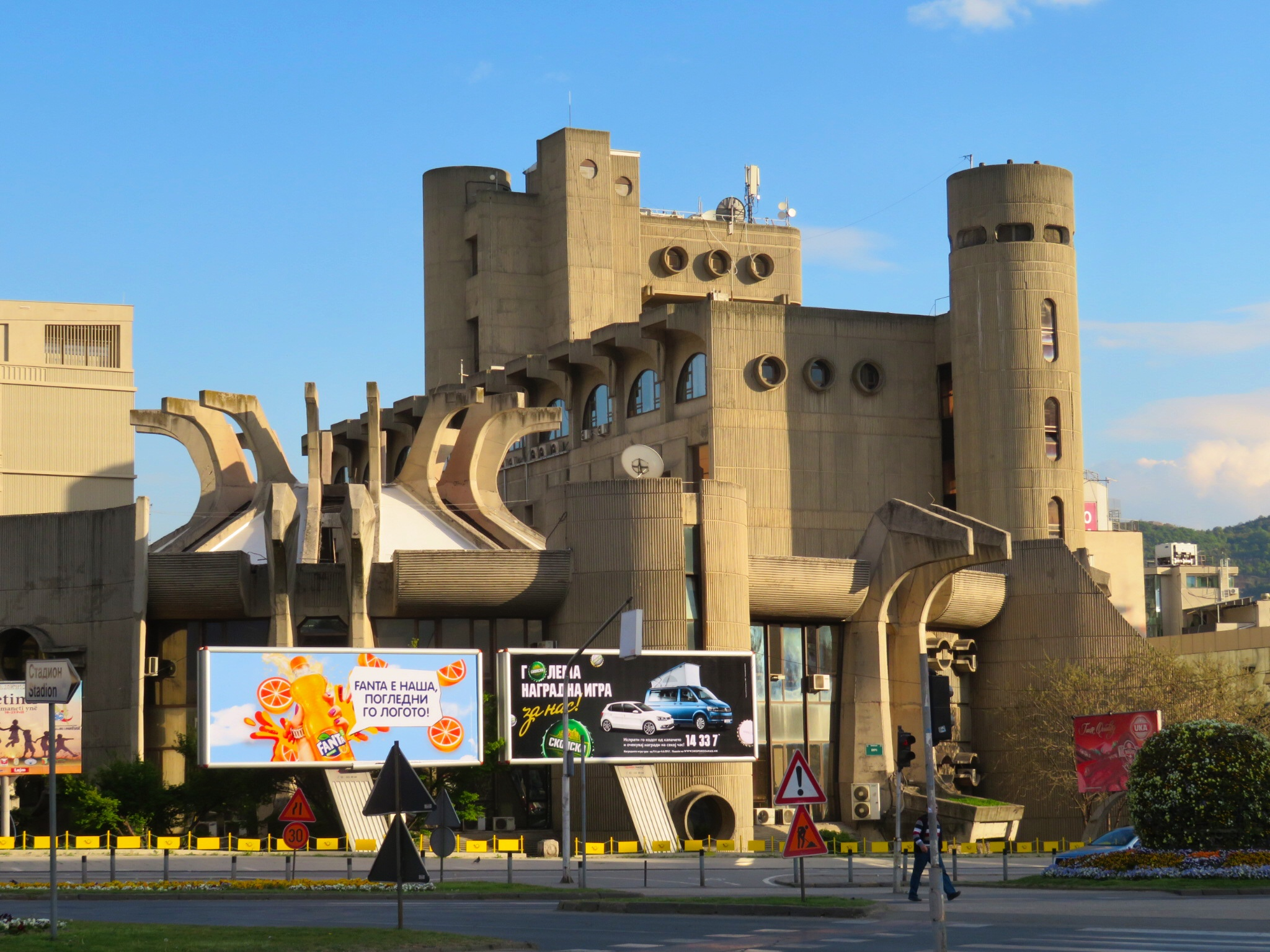 Skopje, Macedonia